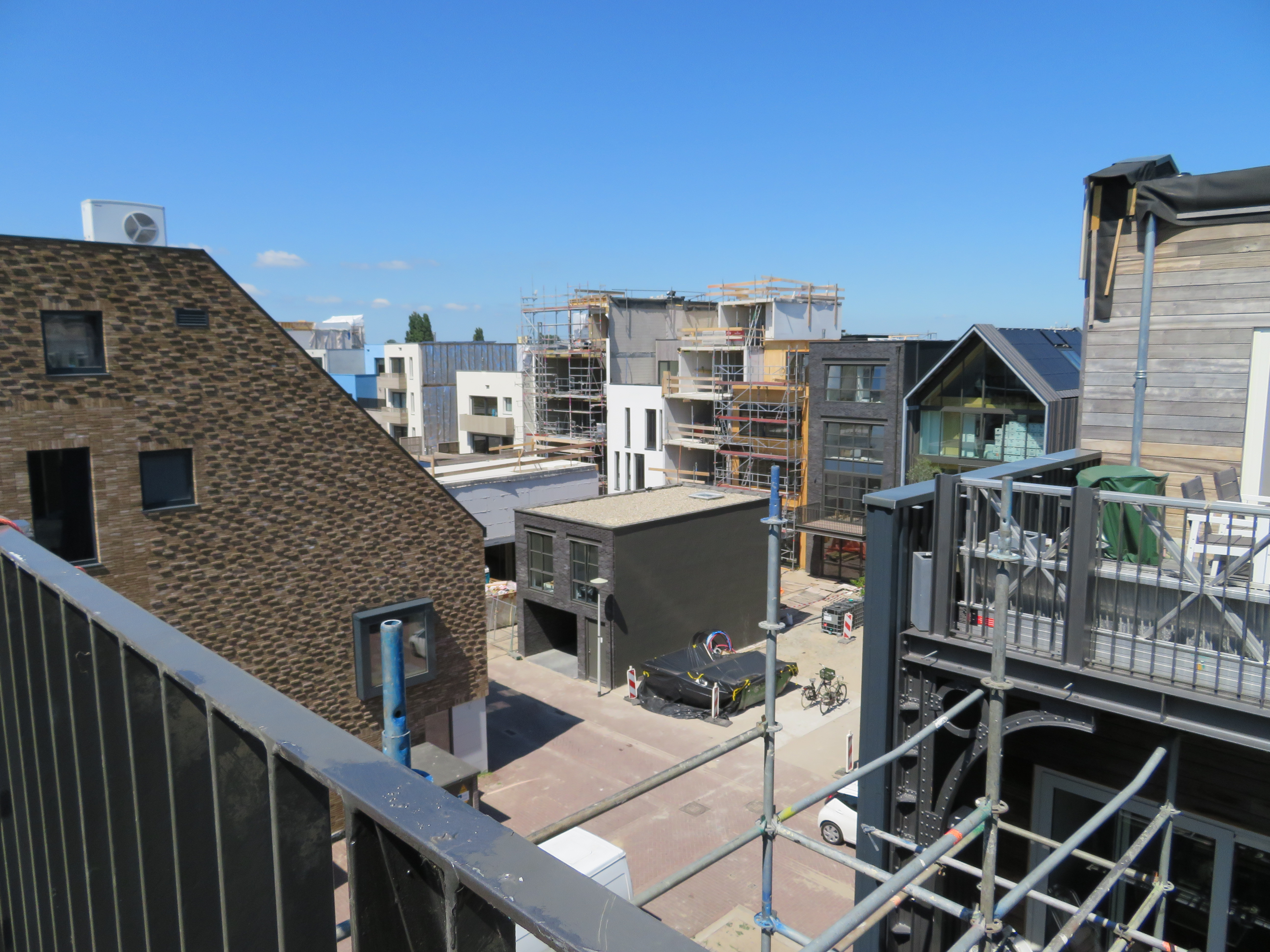 Kaasjeskruidstraat Amsterdam-Noord in aanbouw. Zelfbouwwoningen Buiksloterham